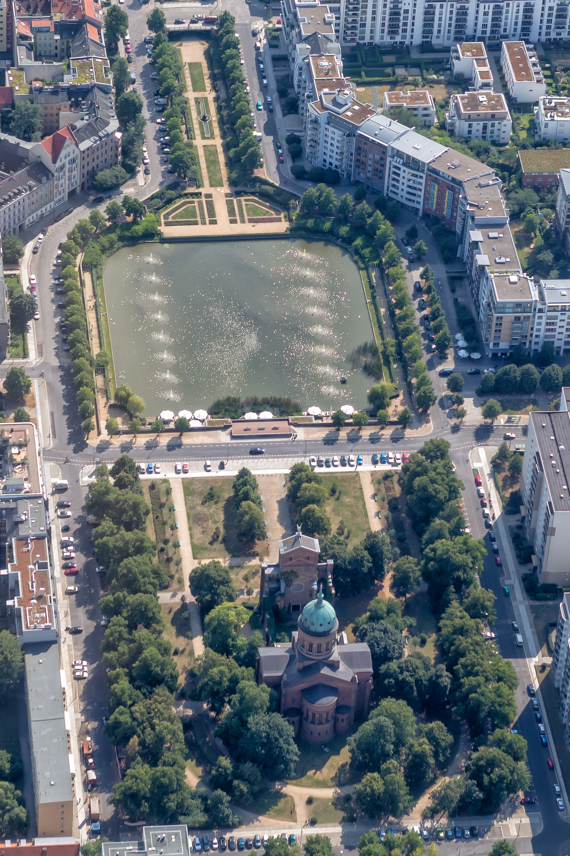 Berlin - Sankt-Michael-Kirche und Engelbecken - 2016